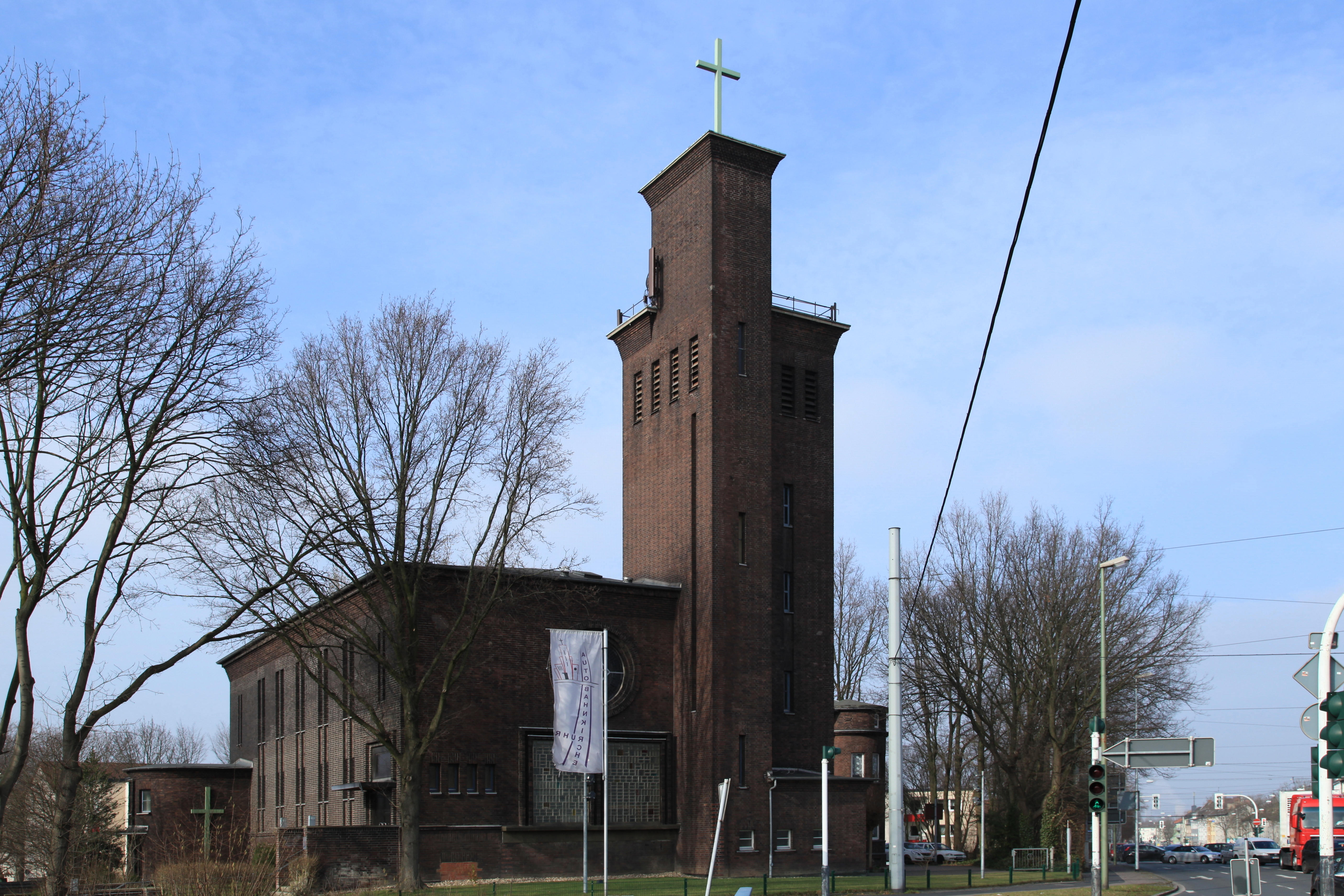 Epiphaniaskirche, Autobahnkirche Ruhr, Dorstener Straße 263 in Bochum